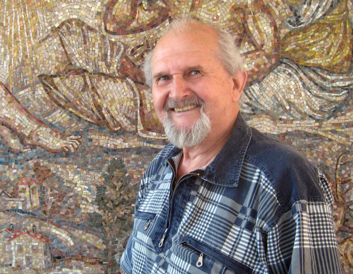 František Tesař